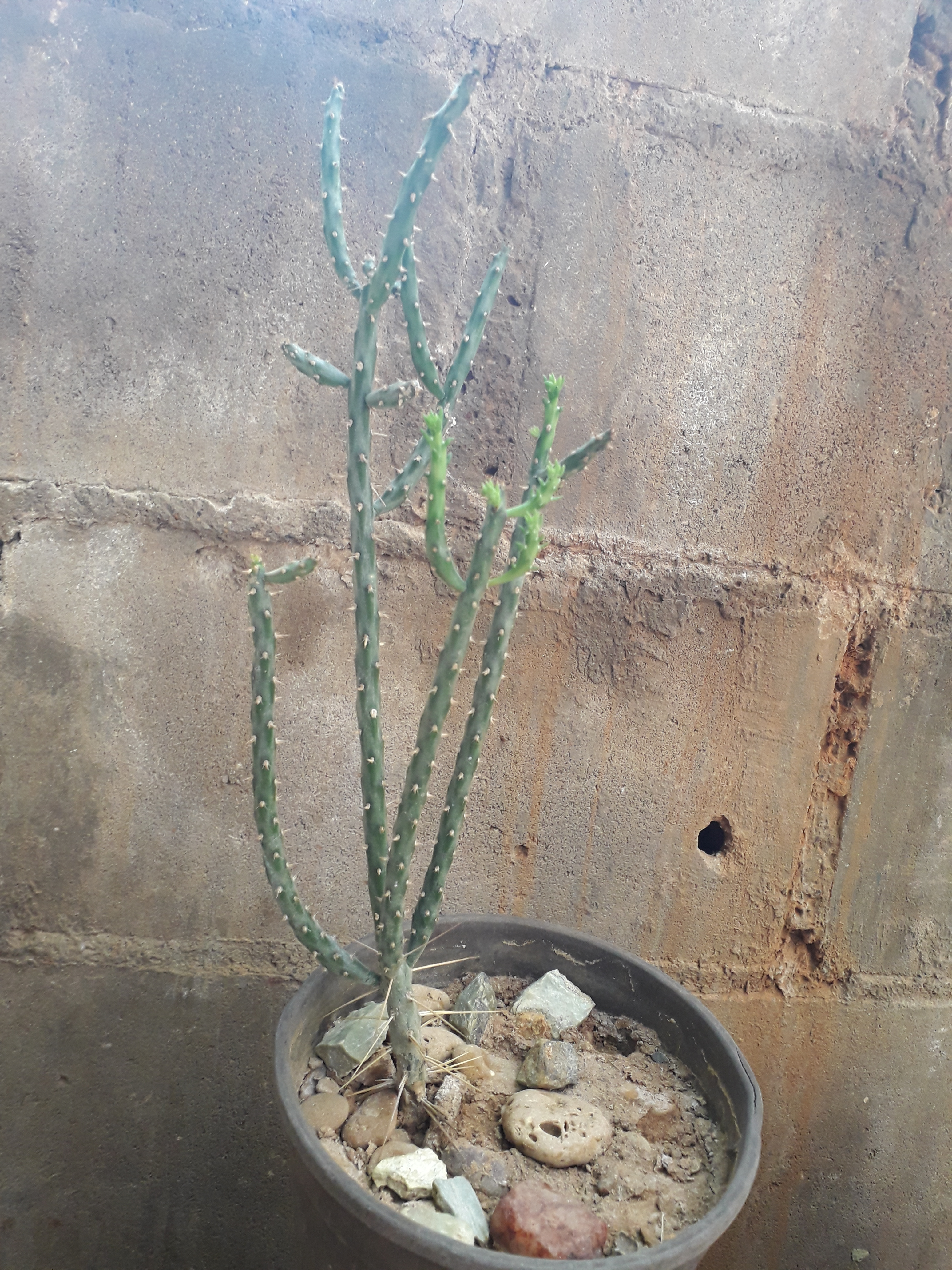 Cylindropuntia × vivipara cultivada de forma ornamental